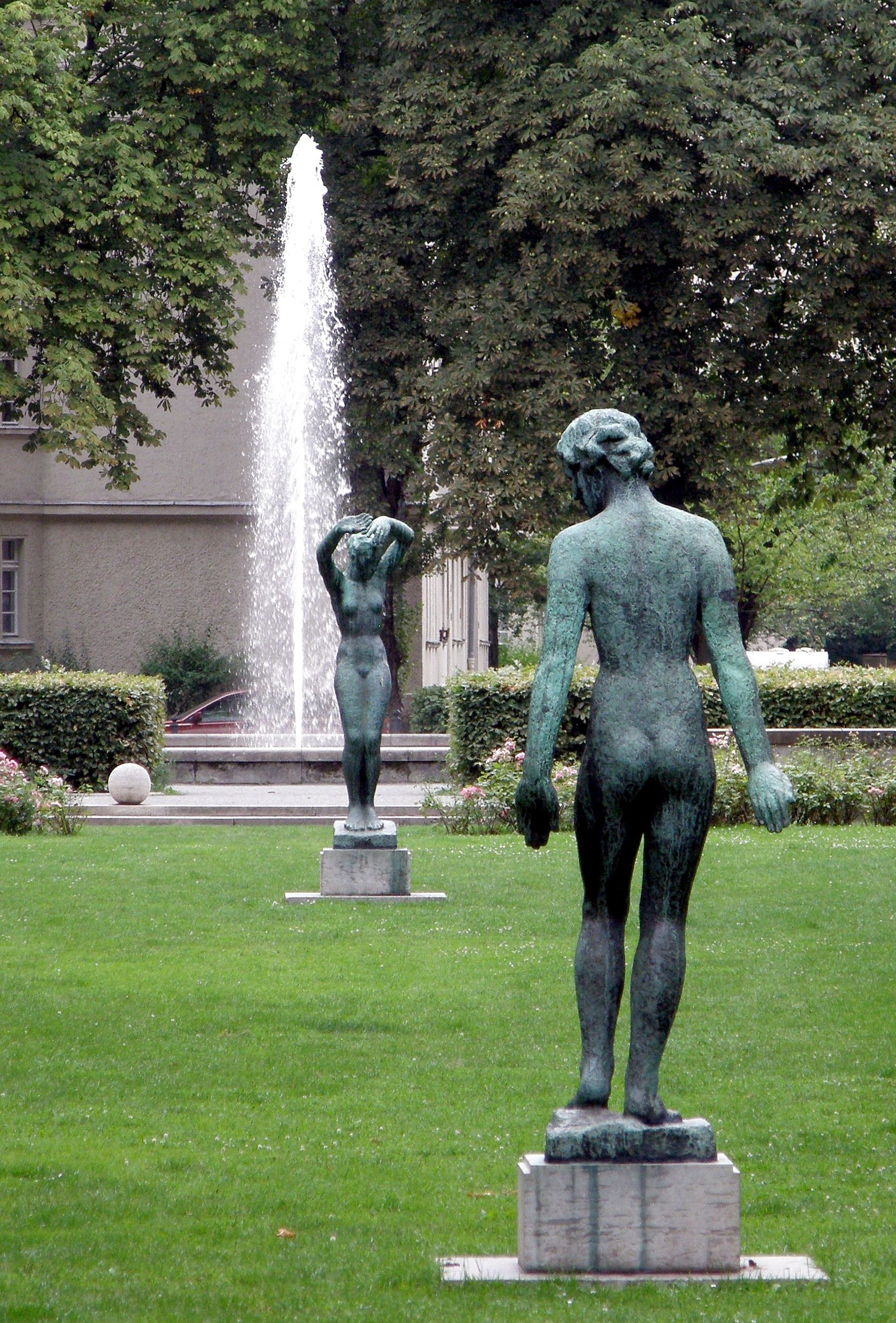 Georg Kolbe: Der Morgen (Hintergrund) und Der Abend (Vordergrund). 1925, Bronze, Höhe ca. 2,5 m. Grünfläche in der Wohnanlage Ceciliengärten in Berlin-Schöneberg.